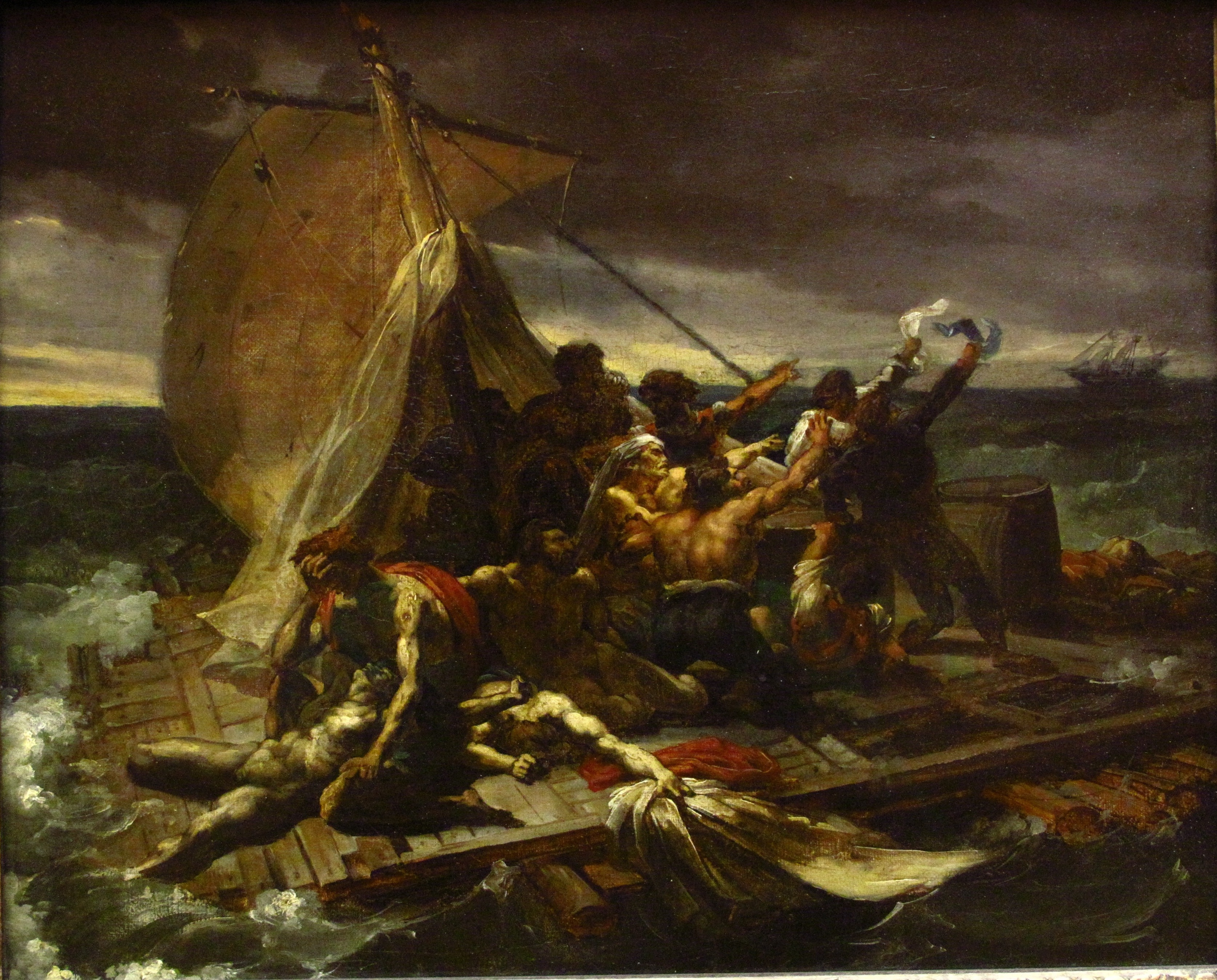 Esquisse exposée au salon de 1819 (salle 69, Moreau-Nélaton).